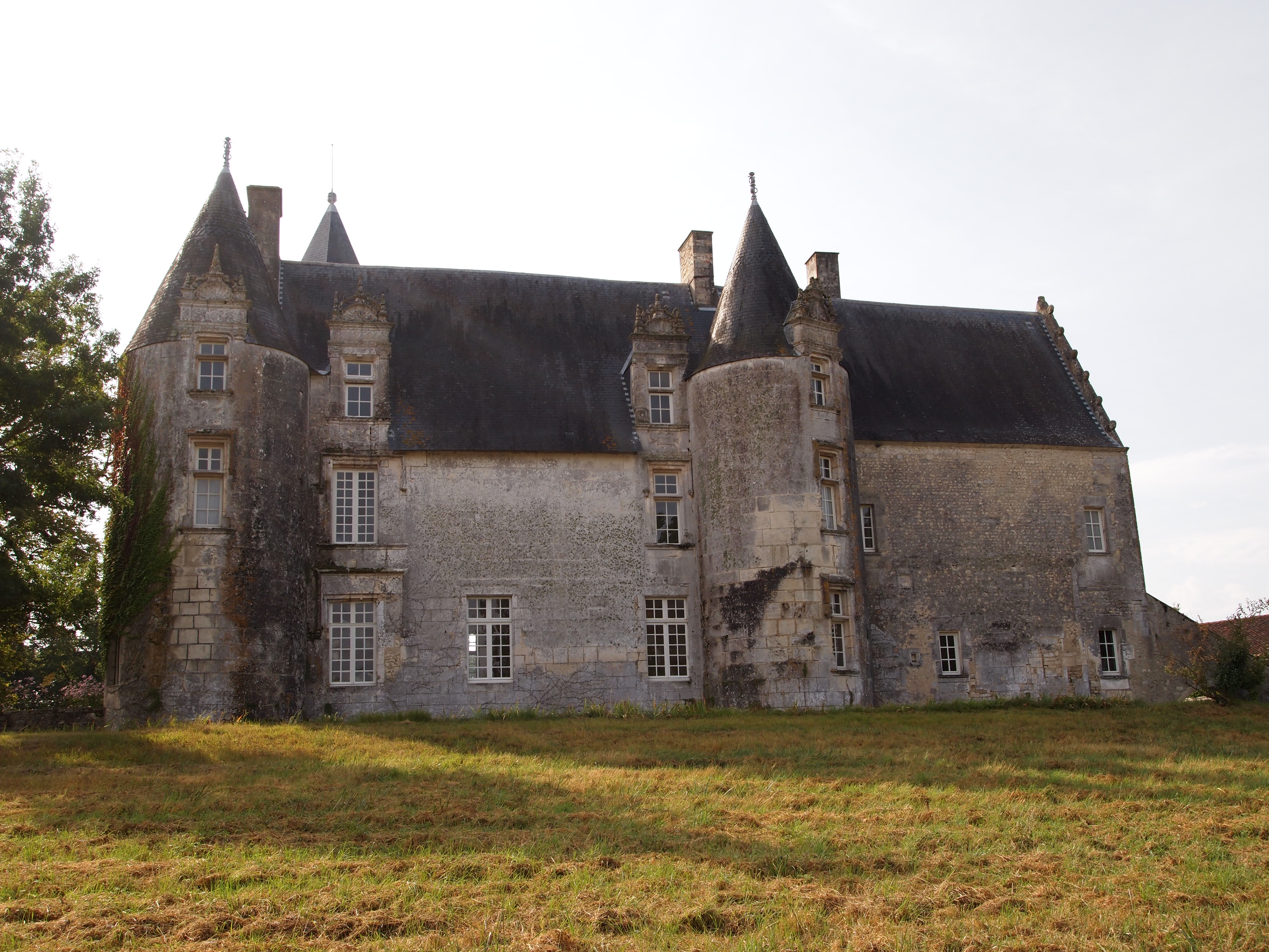 Château du Breuil, à Bonneuil en Charente (inscrit, 1952)